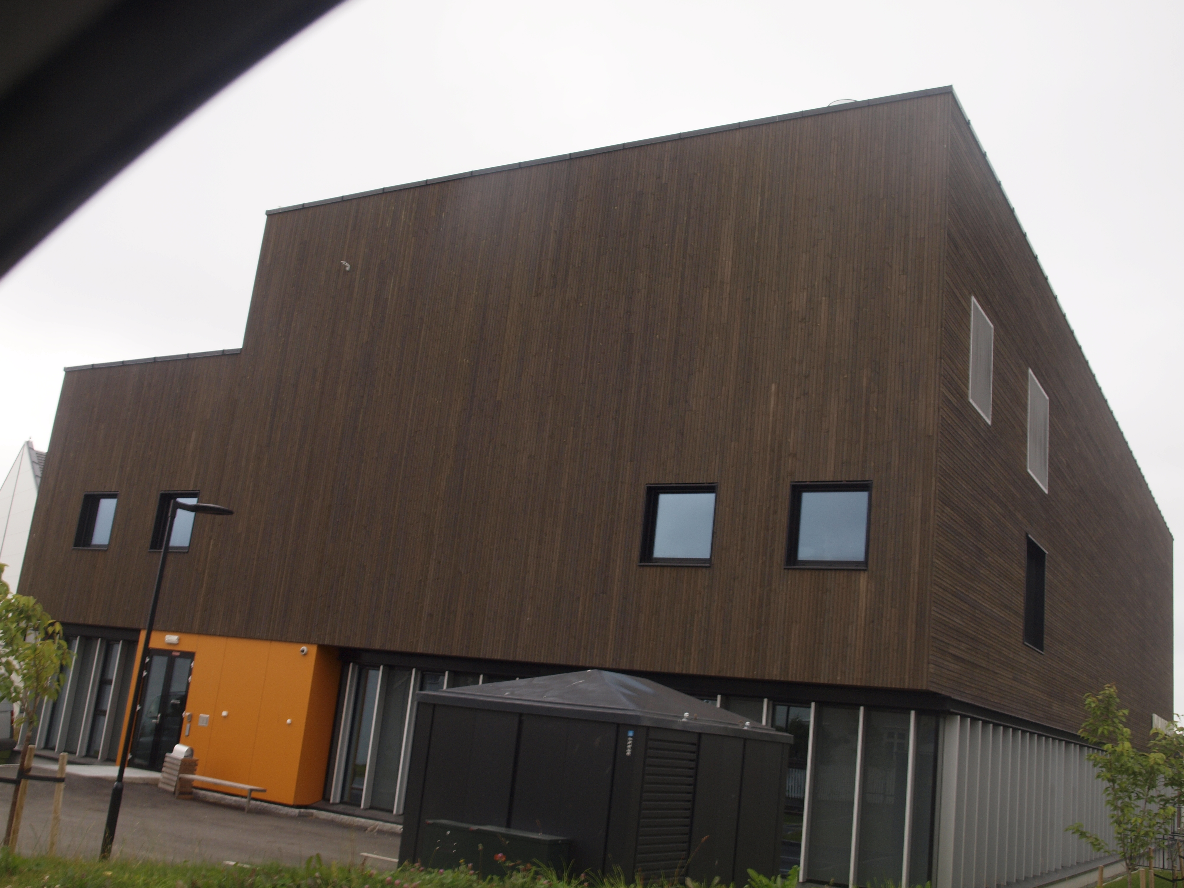 Molde Kulturskole in Molde, Norway